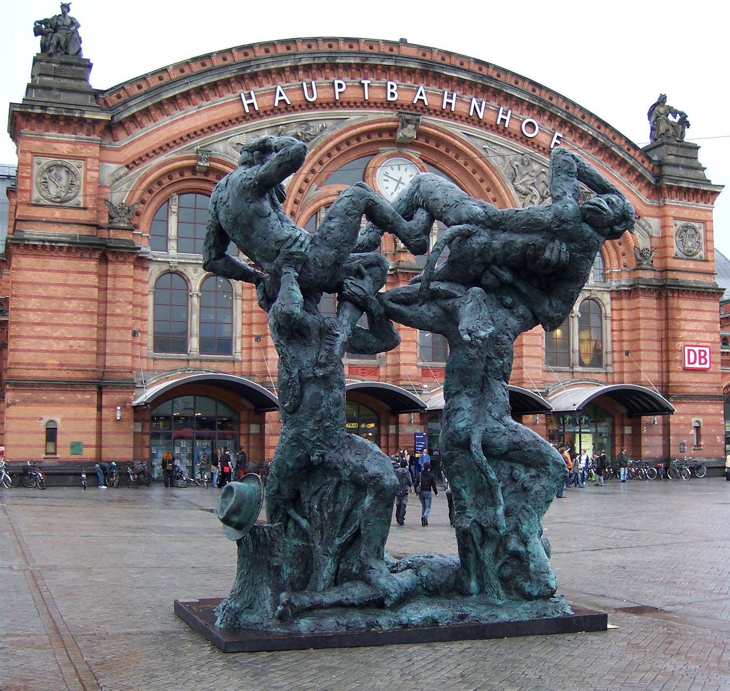 Bronzestandbild "Affentor I" (Höhe 5 m) von Jörg Immendorff am Hauptbahnhof in Bremen. Aufstellung anlässlich der Ausstellung Jörg Immendorff in der Weserburg I (Kunst im Öffentlichen Raum - ein Bremer Programm). Die Leihgabe einer privaten Sammlerin wurde Anfang März 2012 zum Museum der Moderne nach Salzburg verbracht. k: kunst im öffentlichen raum bremen